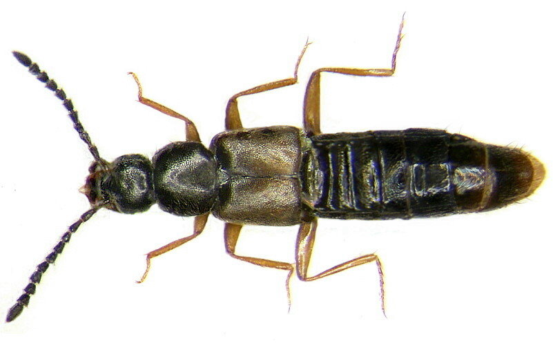 Familie: Staphylinidae Grösse: 3,5-4,7 mm Verbreitung: Europa Ökologie: an schnell fließenden Gewässern in Moos und Schotter Fundort: Germania, Bayern, Oberfranken, Selbitz leg. det. U.Schmidt, 2000 Foto: U.Schmidt, 2006